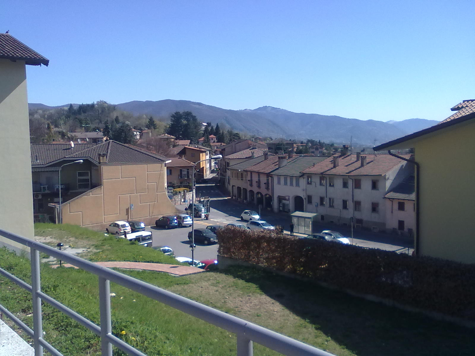 Clivio, via Trentini